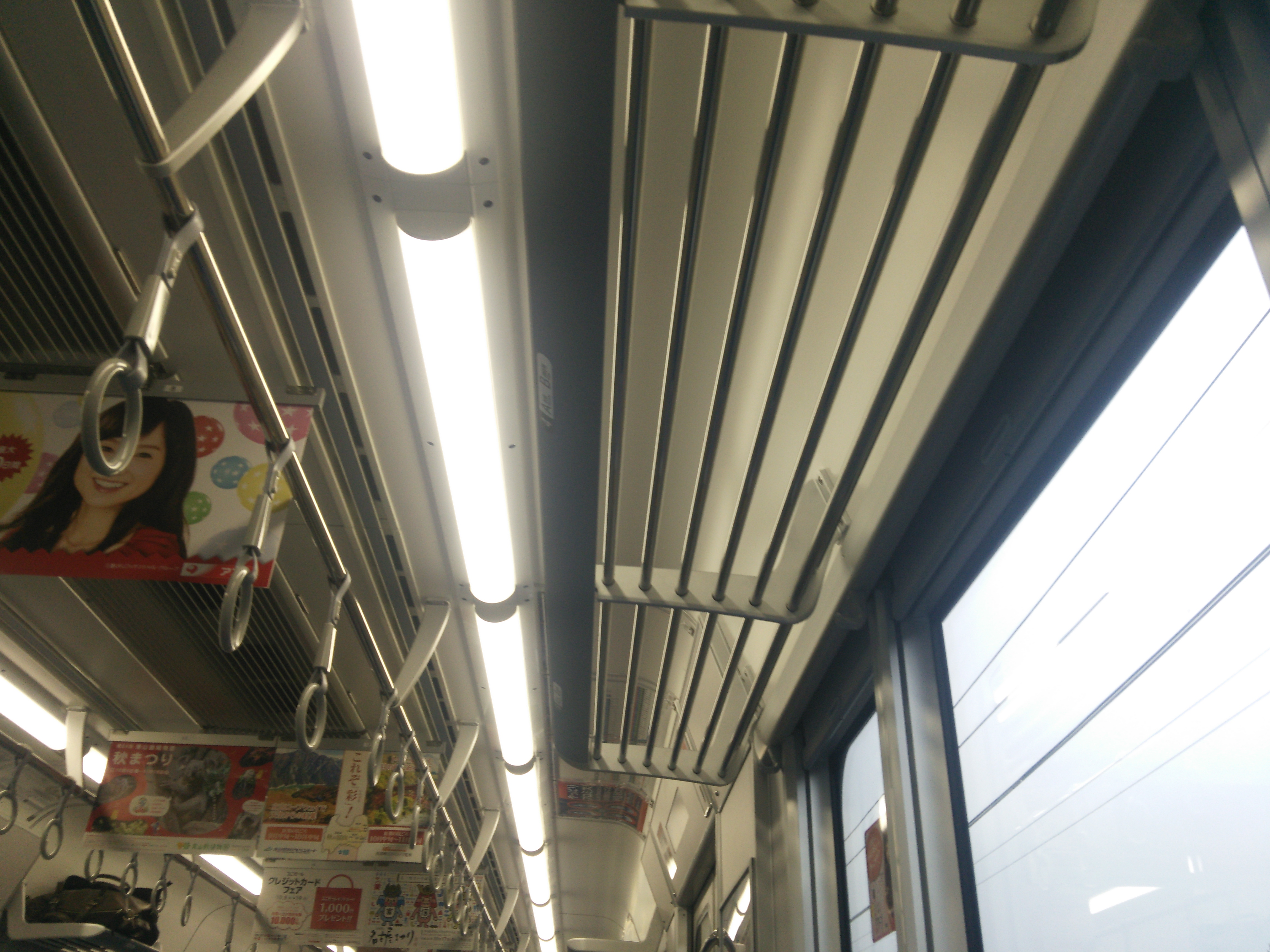 313系5次車のLED照明